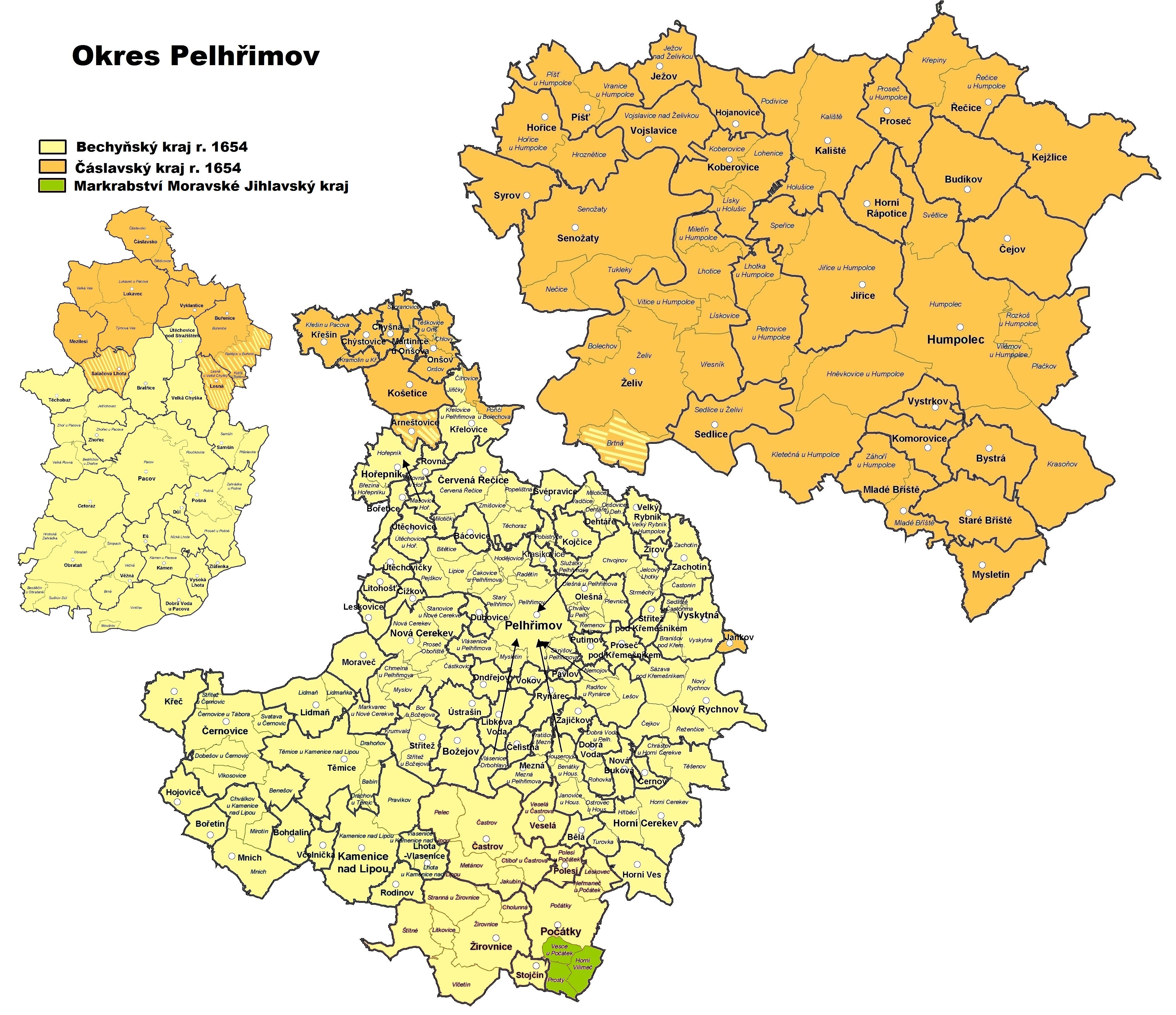 Čáslavský kraj r. 1654 v dnešním okrese Pelhřimov